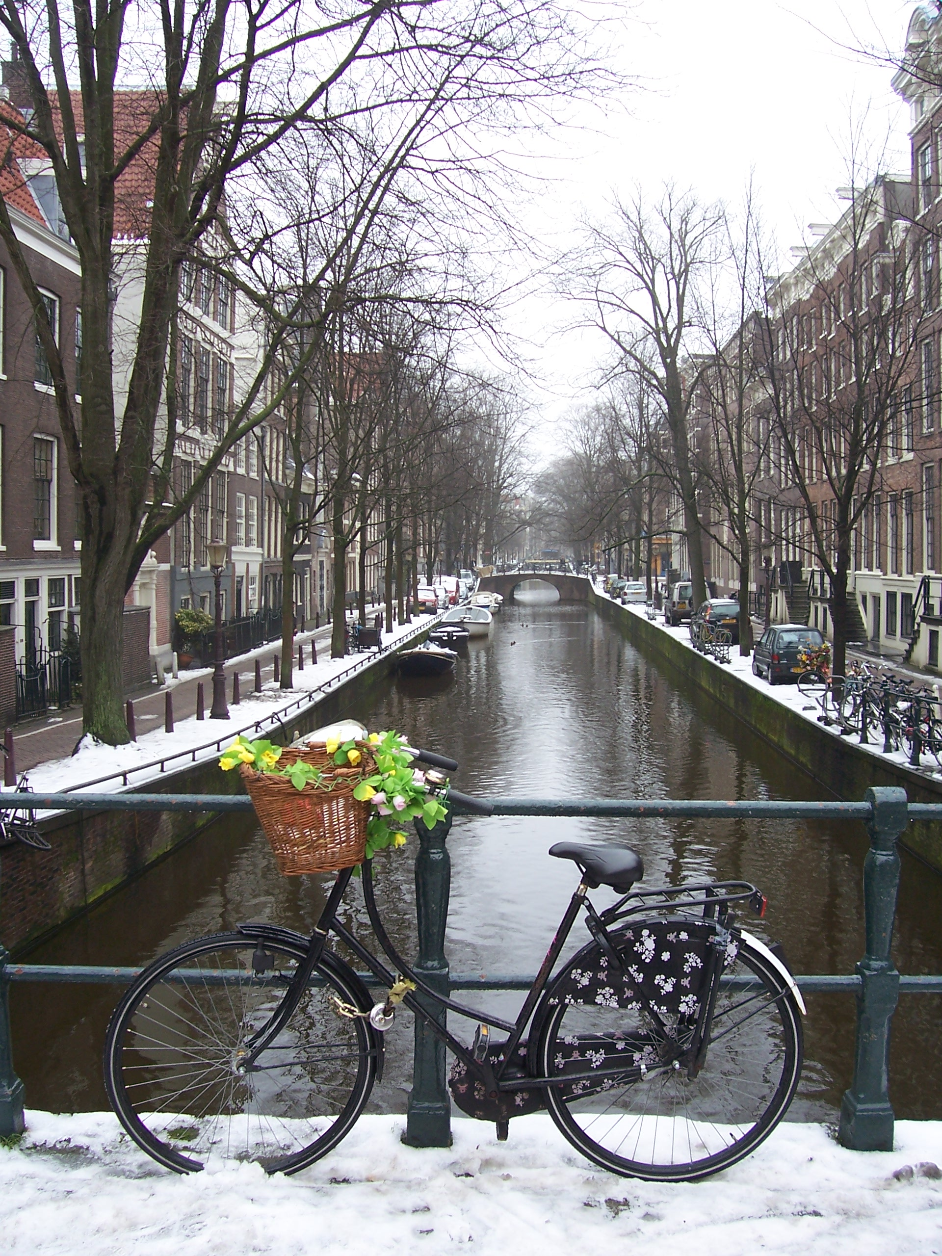 Canaux d'Amsterdam sous la neige.